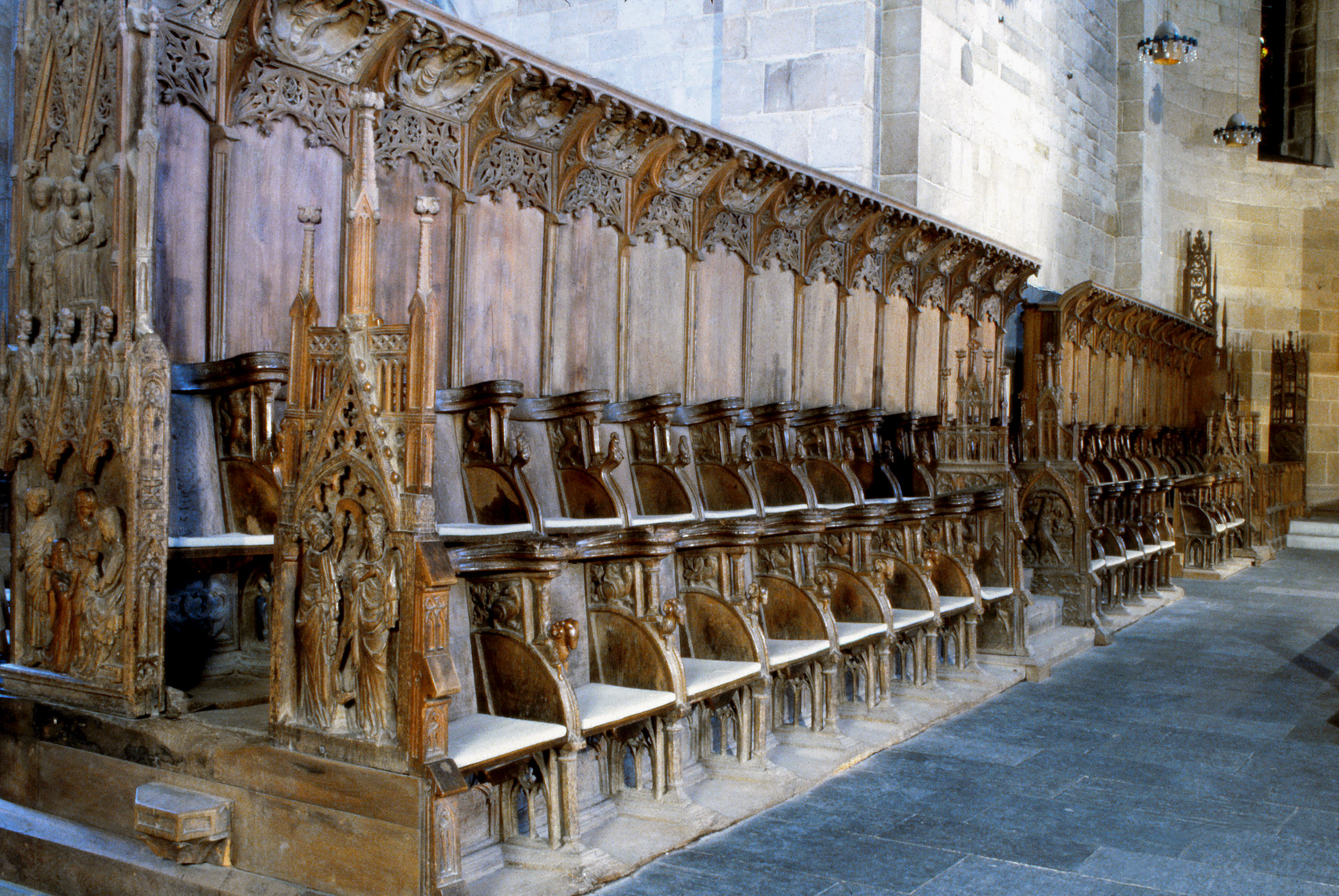 Korstolarna i Lunds domkyrka från 1340-talet.